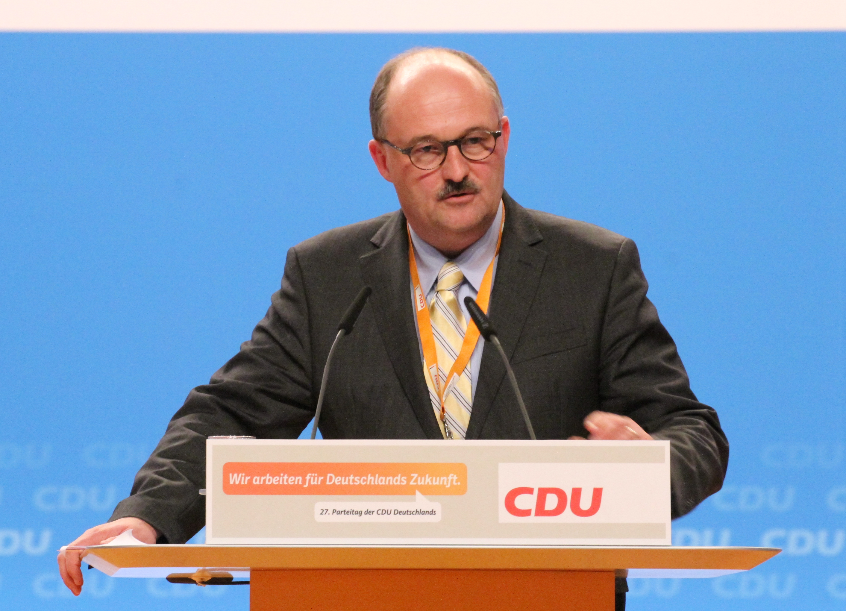 Michael Meister auf dem CDU Bundesparteitag Dezember 2014 in Köln